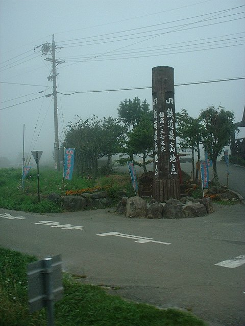 JR鉄道最高地点碑 小海線清里駅～野辺山駅 間